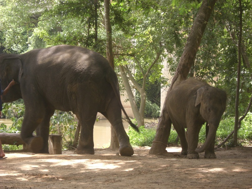 Слонёнок азиатского слона. Таиланд.